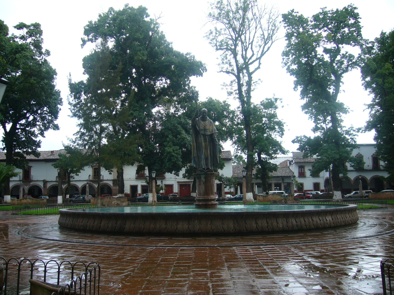 Plaza principal o de Vasco de Quiroga, Pátzcuaro, Michoacán, México.